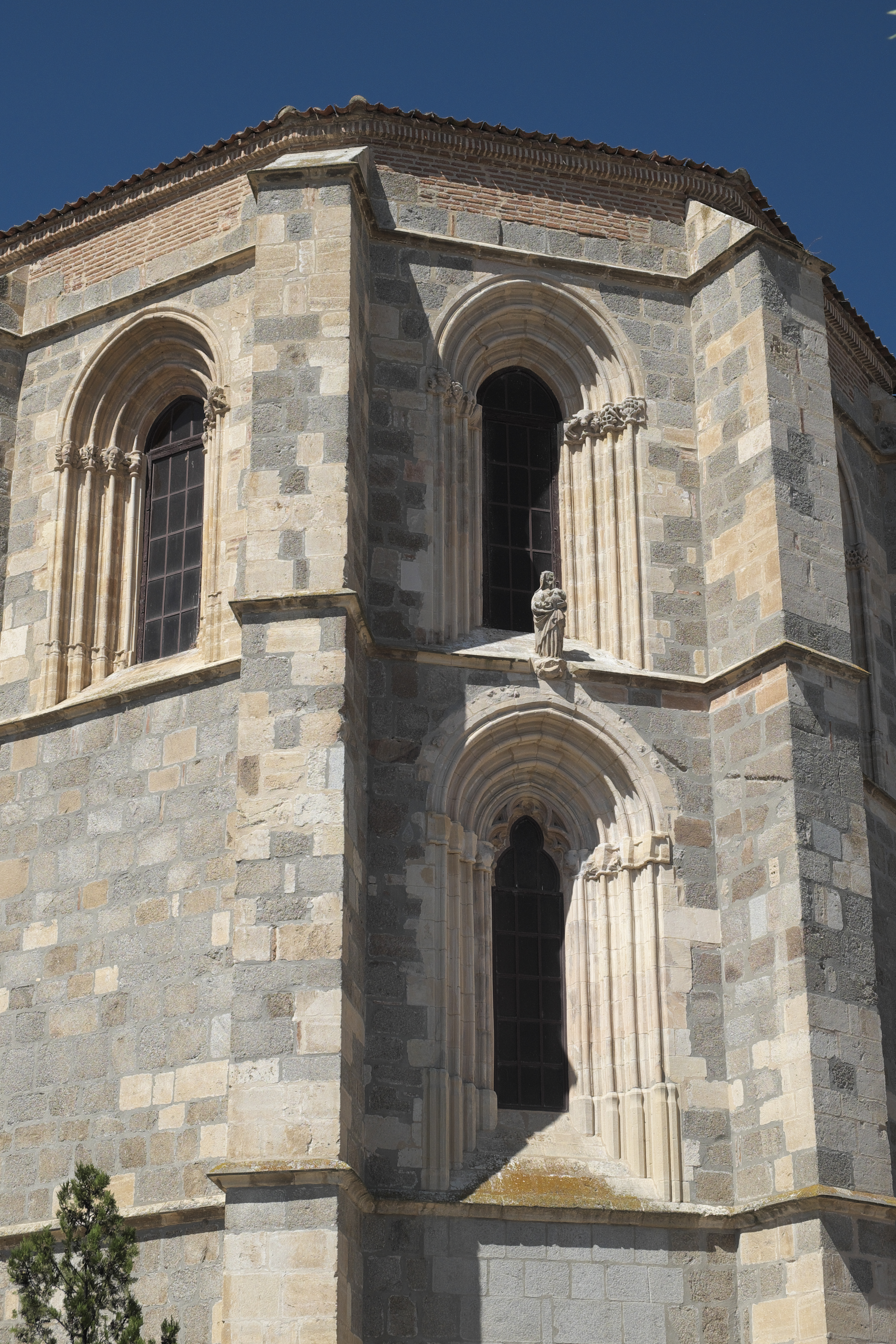 Katholische Pfarrkirche Nuestra Señora de la Soterraña, Kirche des ehemaligen Dominikanerklosters in Santa María la Real de Nieva in der Provinz Segovia (Kastilien-León/Spanien), Apsis